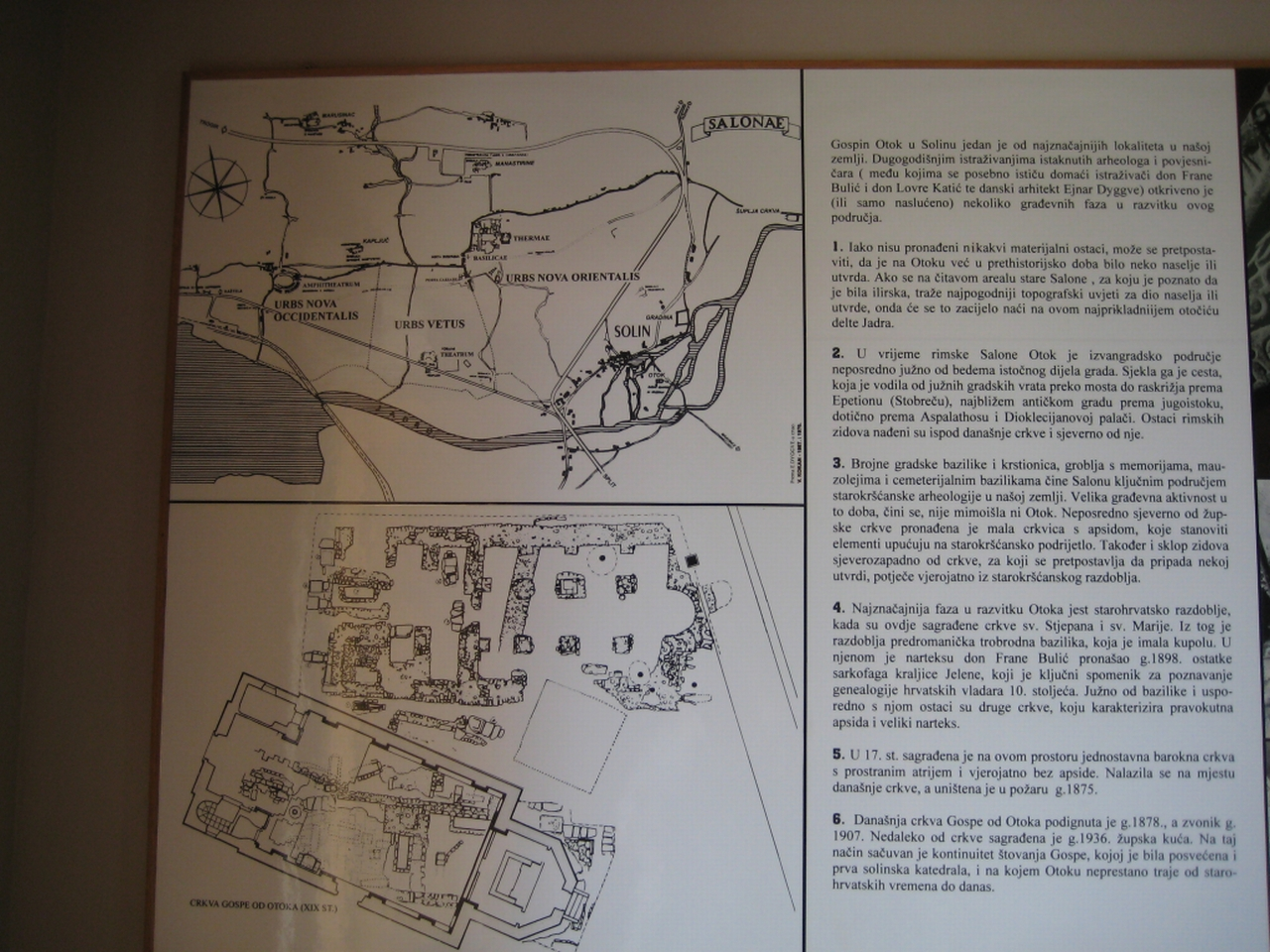 Plan Gospinog otoka, Solin, Croatia